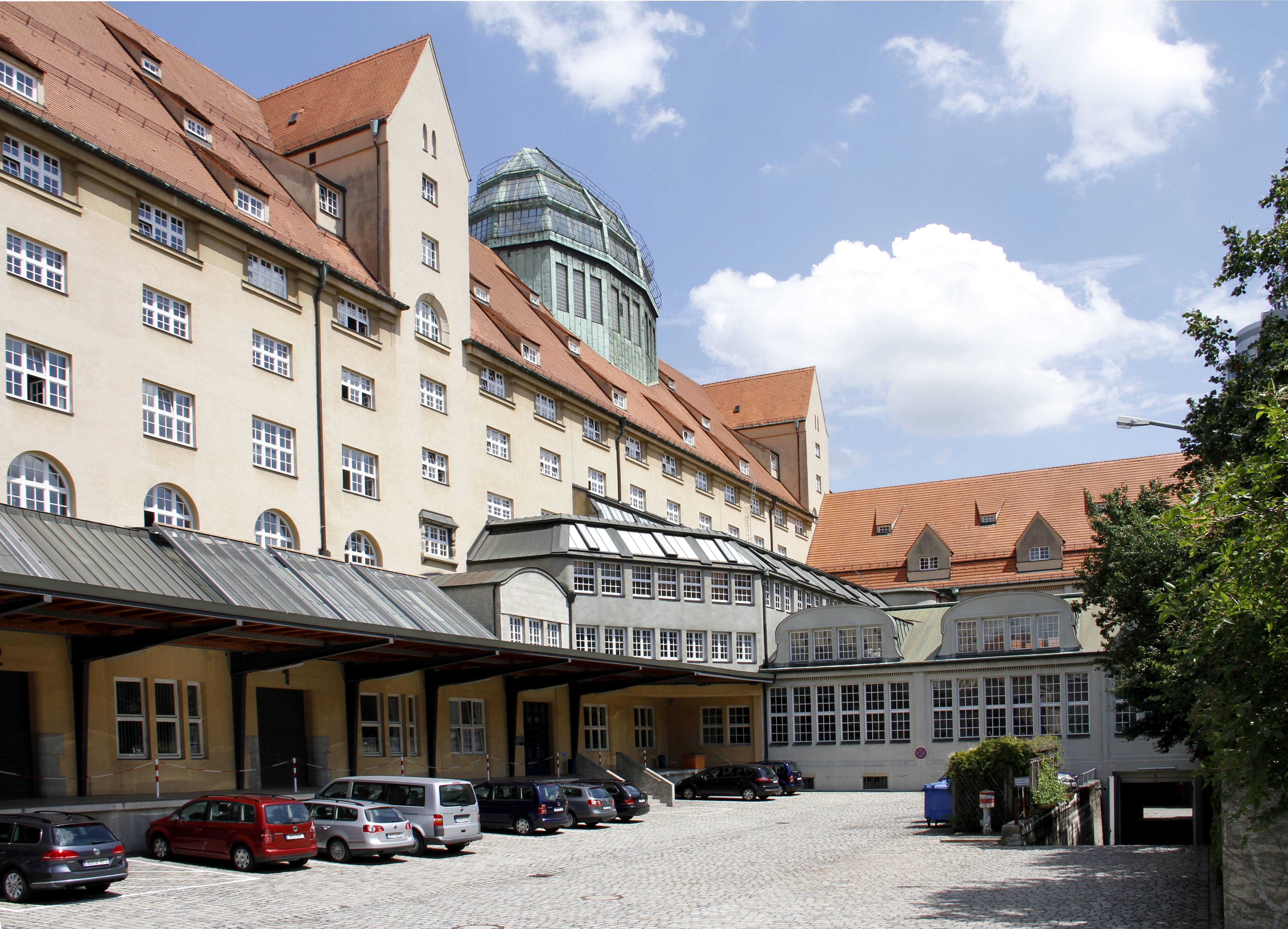 Hauptzollamt München, Zollhof. Links das Lagerhaus mit der Glaskuppel und Laderampe. Im Zentrum im ersten Stock herausragend der Revisionssaal für das Zollniederlageverfahren, daran nach rechts anschließend der Revisionssaal für den normalen Zollbetrieb. Darunter die Rampe mit Zufahrt zum Lichthof und den Kellern.